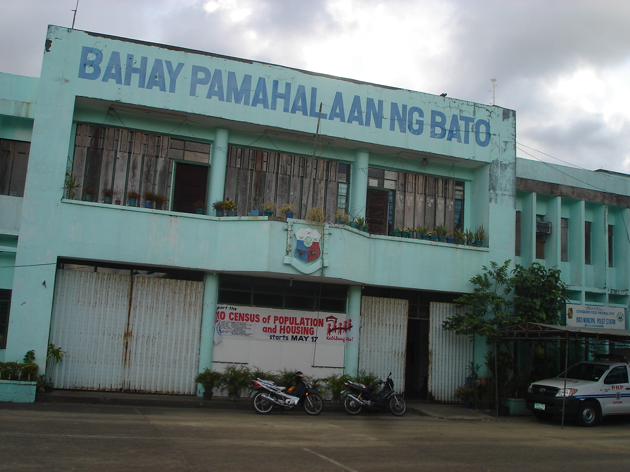 Bato, Catanduanes, Philippines